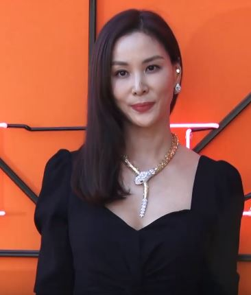 배우 고소영이 16일 오후 서울 반얀트리 클럽 앤 스파에서 열린 한 이탈리아 브랜드 포토 행사에 참석해 포즈를 취하고 있다.